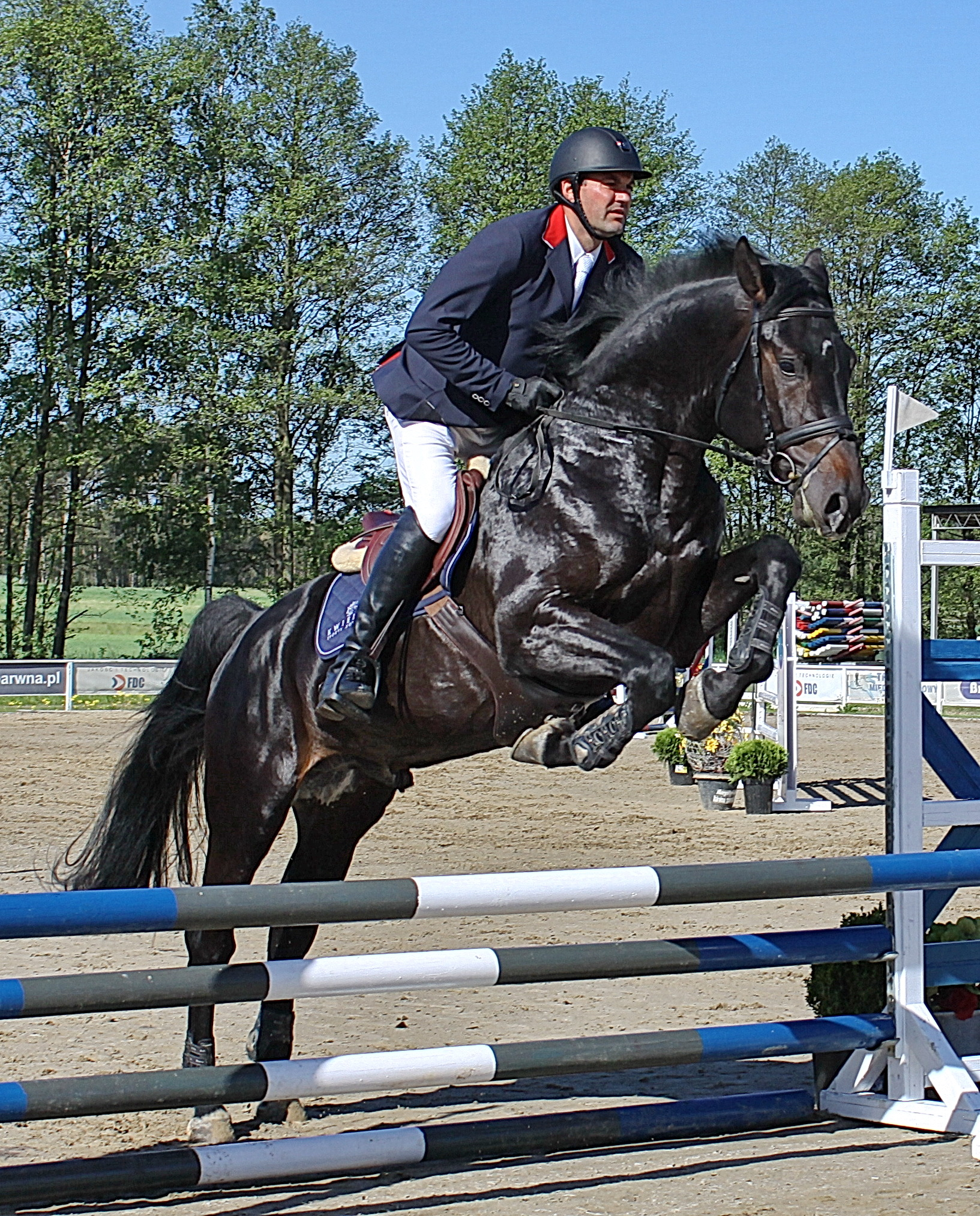 Kamil Rajnert na zawodach sportowych w Kwiekach (2017).